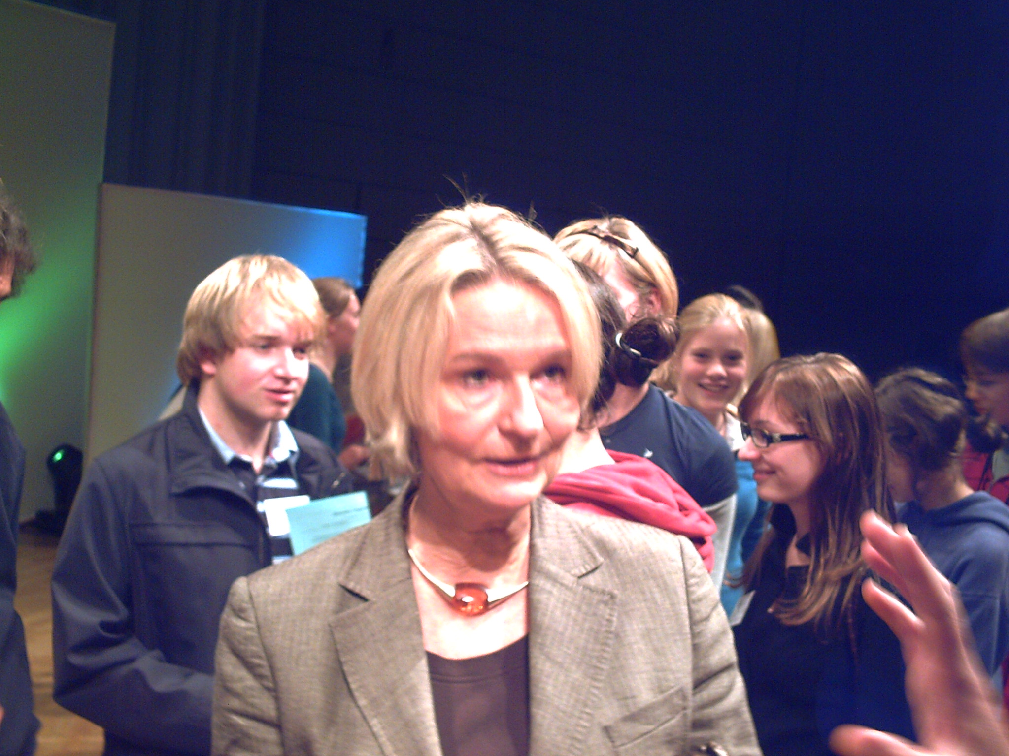 Kirsten Boie bei der Verleihung des Sonderpreises des Deutschen Jugendliteraturpreises im Rahmen der Frankfurter Buchmesse, wo sie für ihr Lebenswerk ausgezeichnet wurde.